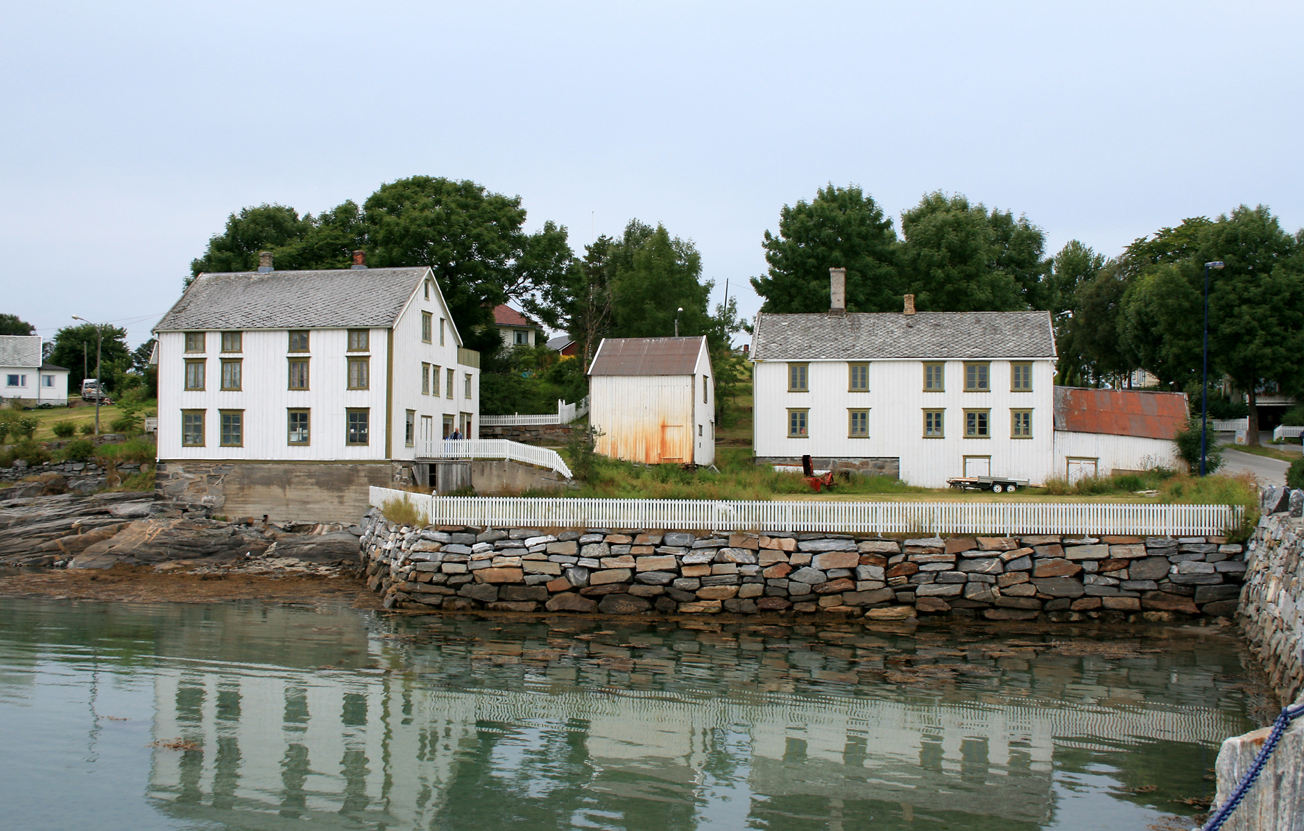 Handelsstedet på Tjøtta, Nordland.